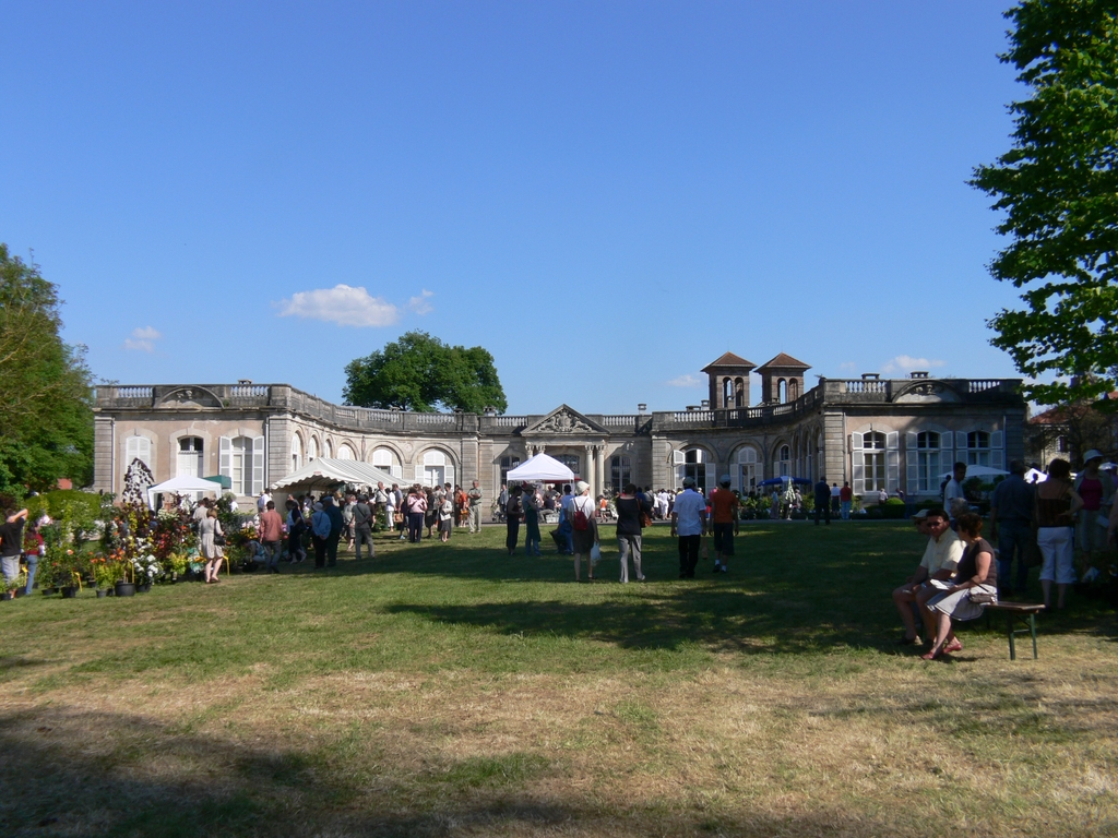 Château de Gerbéviller, Lorraine, France